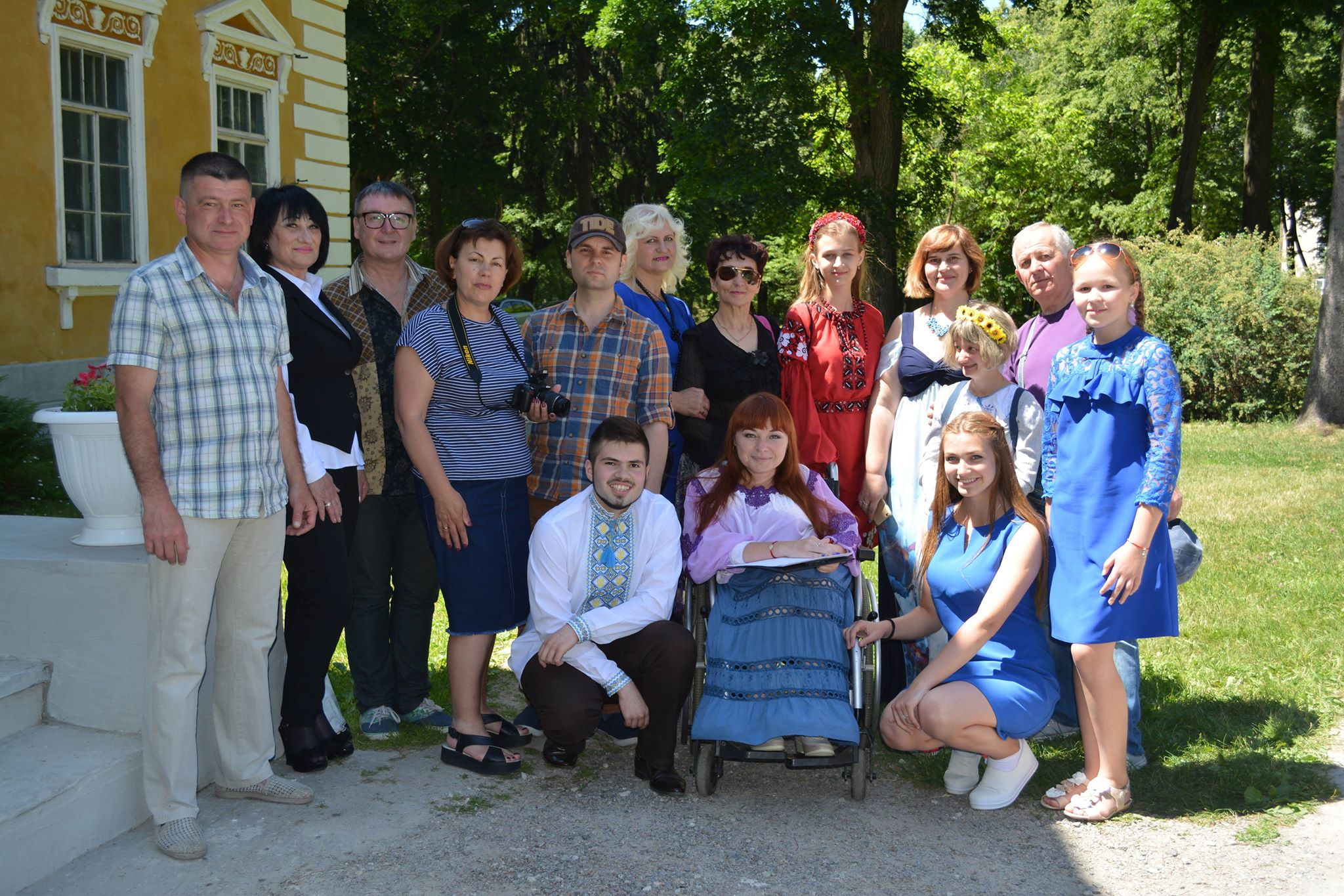 Окремі учасники Імпрези по-самчиківськи